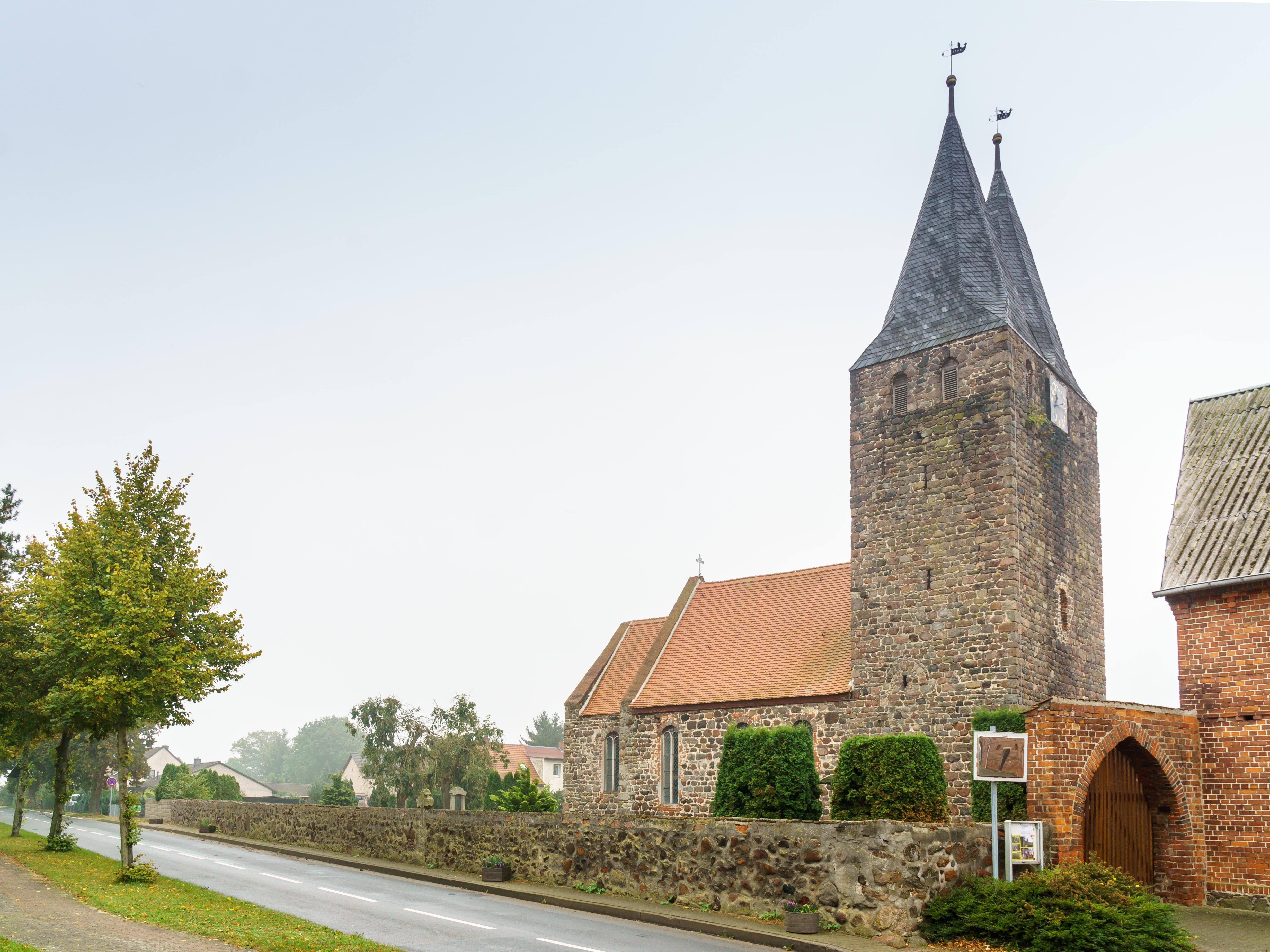 Kirche Klein Schwechten mit einem in der Friedhofsmauer teilweise eingemauerten Gotisches Kreuz